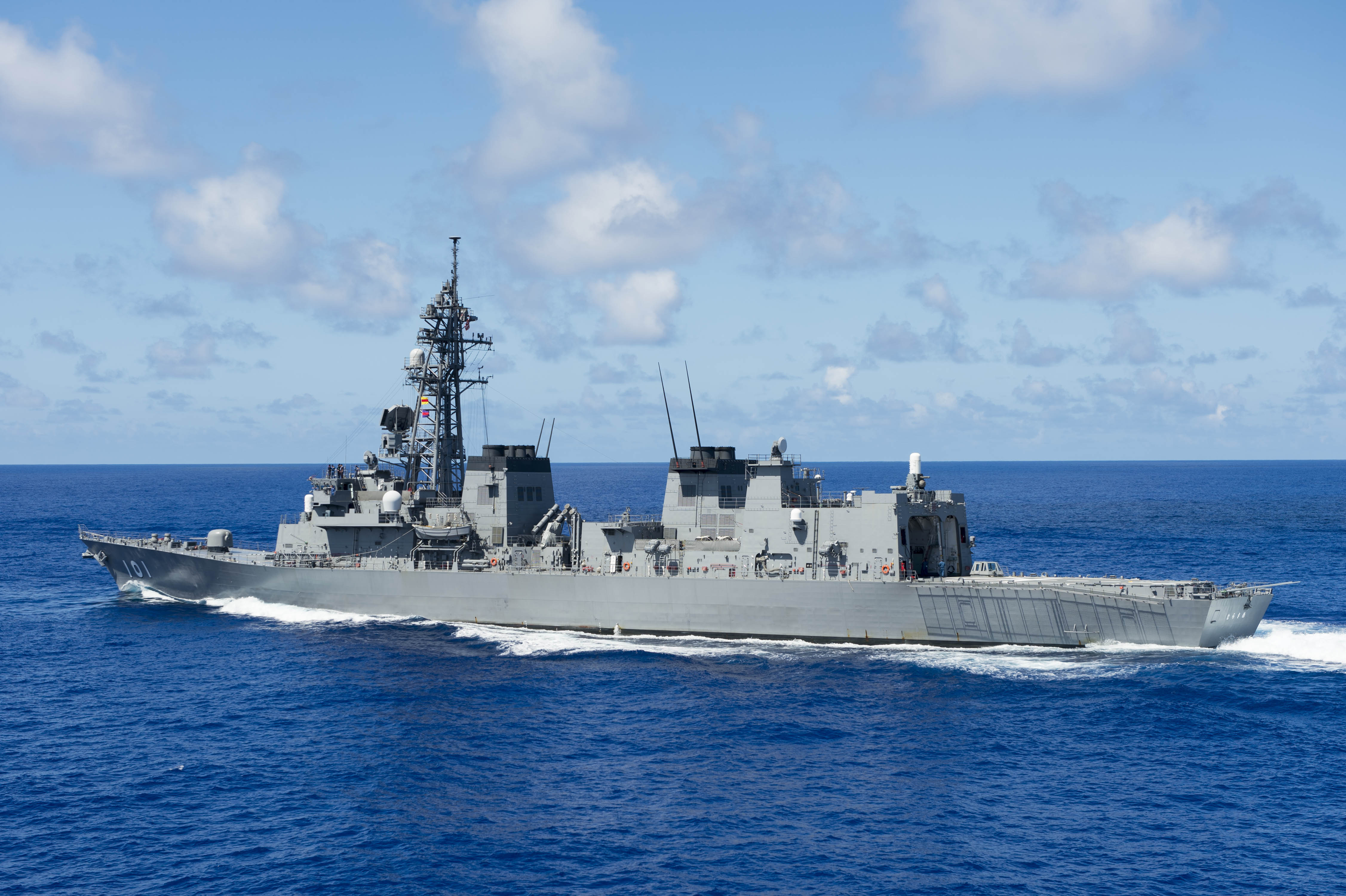 太平洋を航行する護衛艦むらさめ。米イージス艦プレブルより撮影。